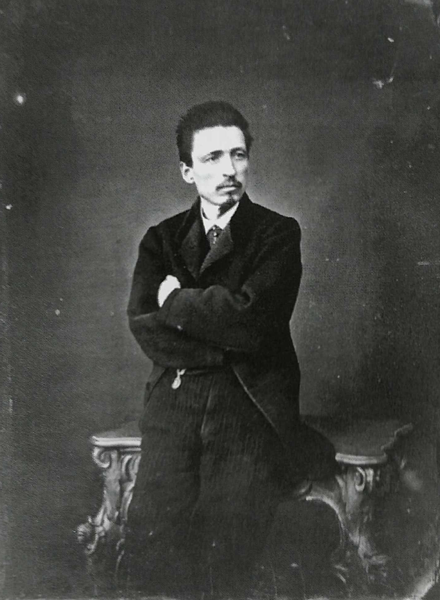 Giovanni Battista Unterveger, Autoritratto, 1875 circa